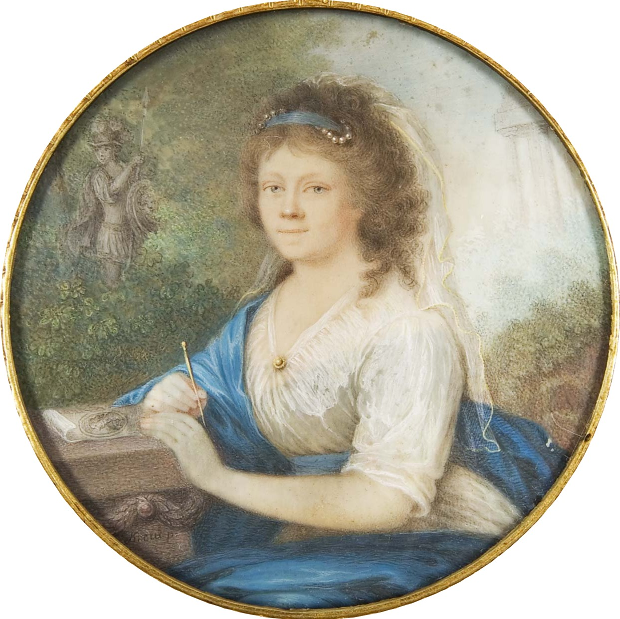 Porträt der Schriftstellerin Amalie von Imhoff (1776-1831)